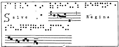 Texto en Gregoriano. Palabras y música en correspondencia alternativa